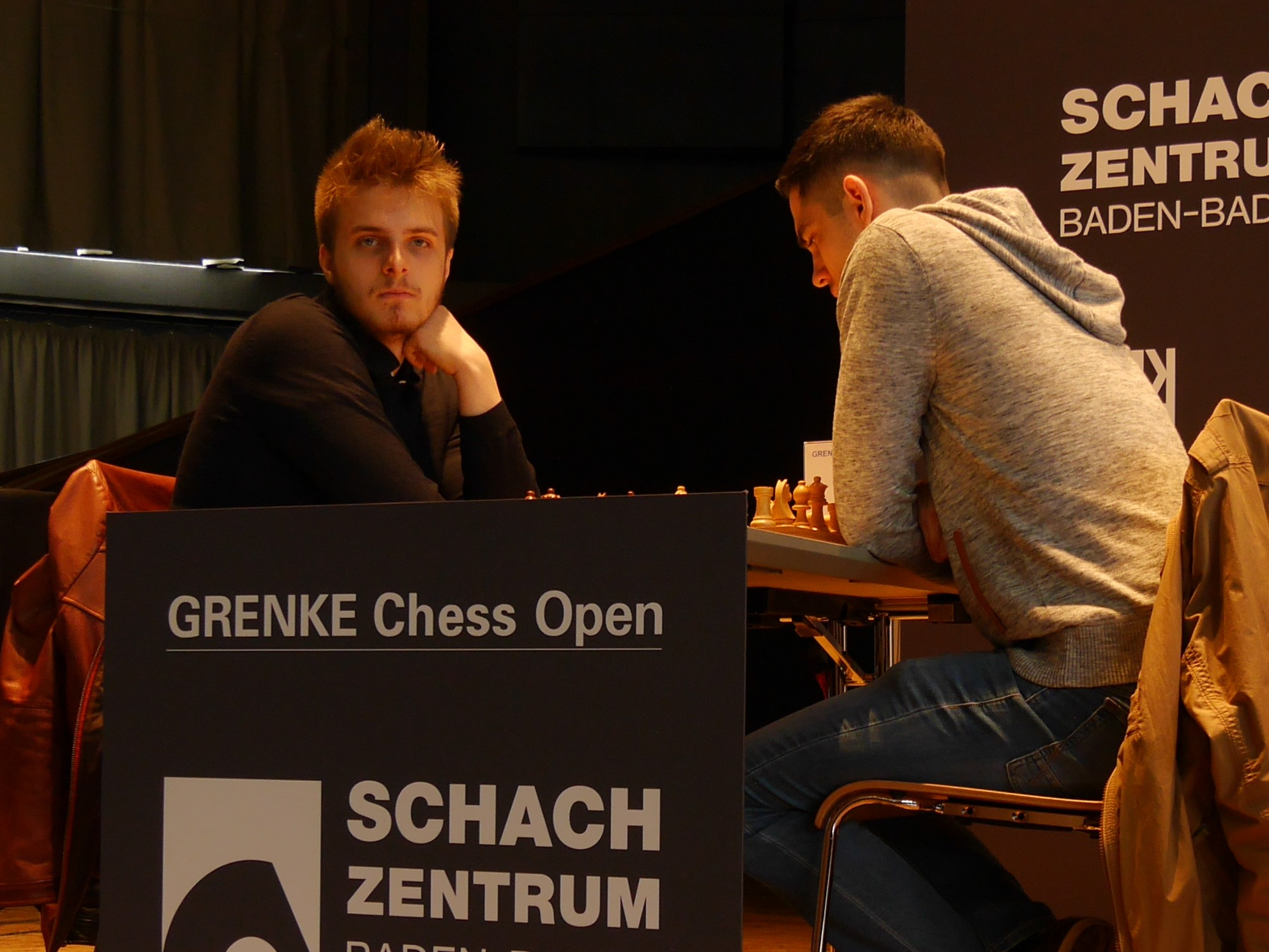 Gabor Papp (rechts) - Richard Rapport, Grenke Chess Open 2017 in Karlsruhe.